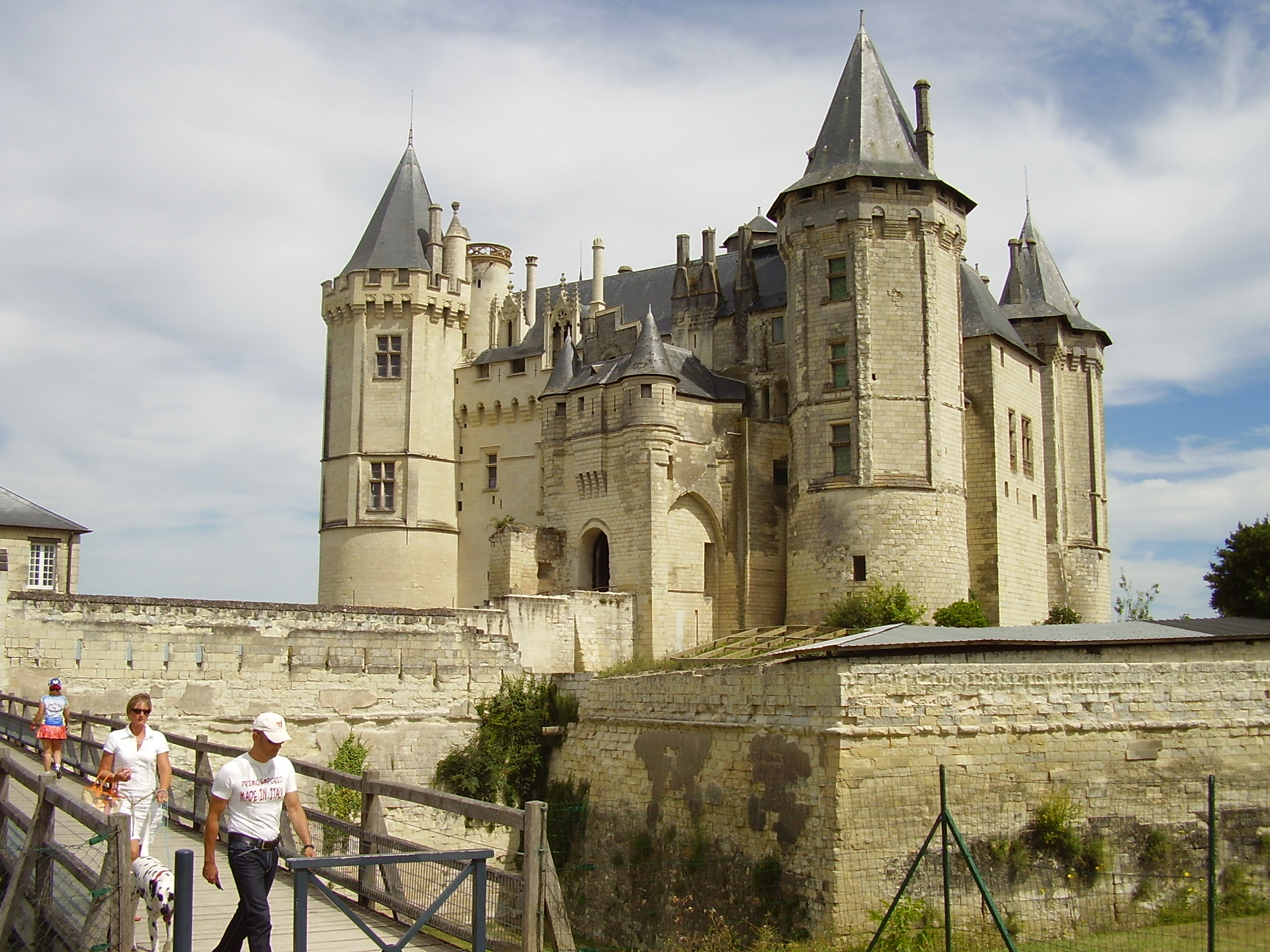 Château de Saumur, Frankreich